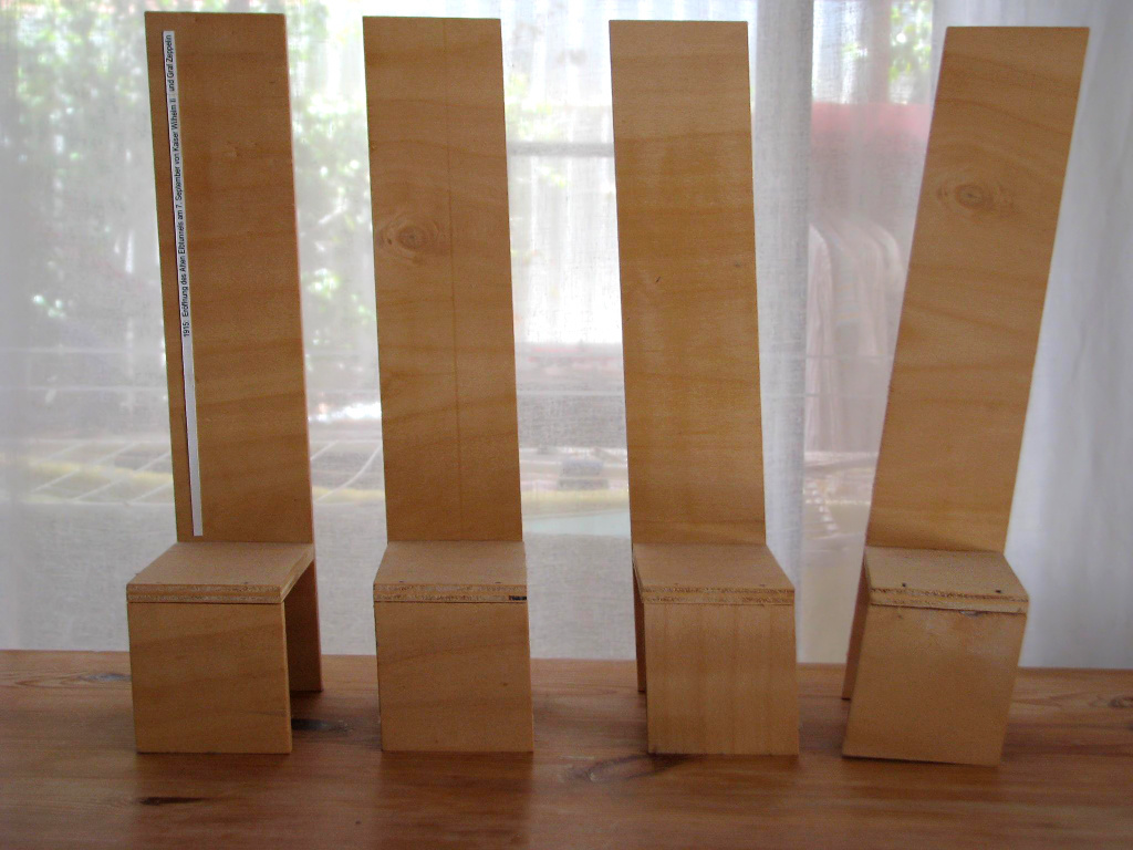 Modelle zum Stuhlkreis 2008